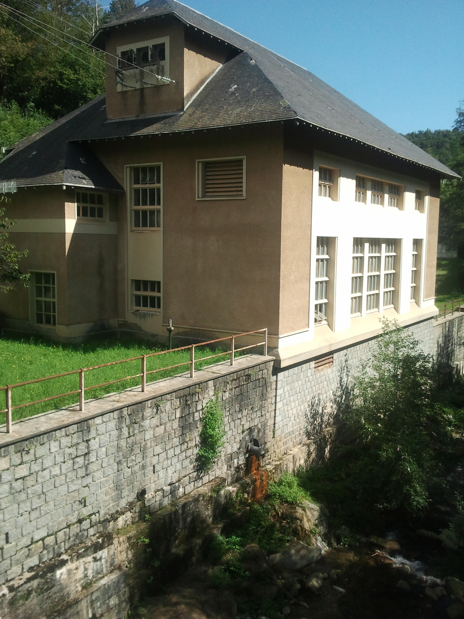 Centrale hydroélectrique de Llau et la Coumelade